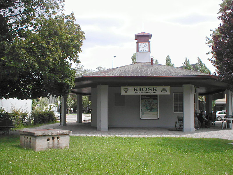 Tiefbunker beim Industrieplatz in Heilbronn. Im Vordergrund Entlüftungsschächte. Der Zugang erfolgte über zwei Treppen neben dem Gebäude.